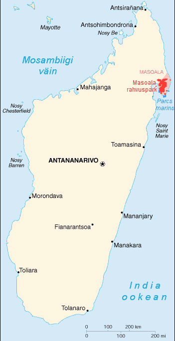 Masoala asukoha kaart. Tõlgitud ja muudetud. Masoala poolsaar märgitud roosalt, rahvuspark punaselt ja kaitstavad korallrahud siniselt.